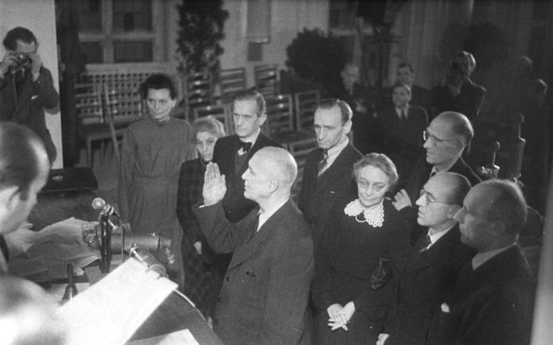 ADN-ZB/Donath Berlin: 1. Stadtverordnetensitzung am 26.11.1946 im Saal des Neuen Stadthauses in der Parochialstraße, UBz.: Oberbürgermeister Dr. Ostrowski (SPD) während der Vereidigung. 1.v.r.: Dr. Friedensburg, 3.v.r.: Luise Schröder. Wahl der 1. Stadtverordneten am 10.10.1946.